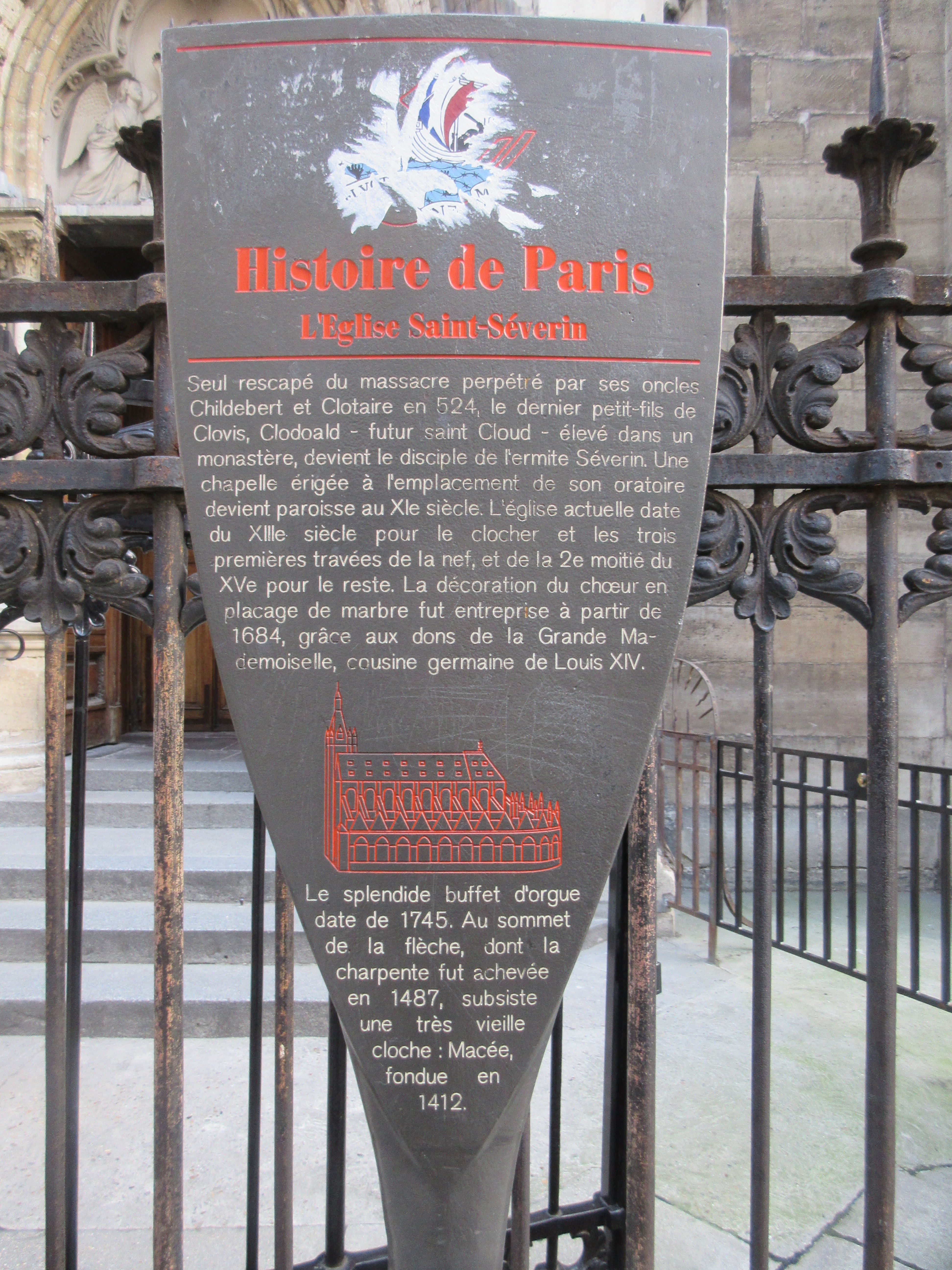 Panneau Histoire de Paris